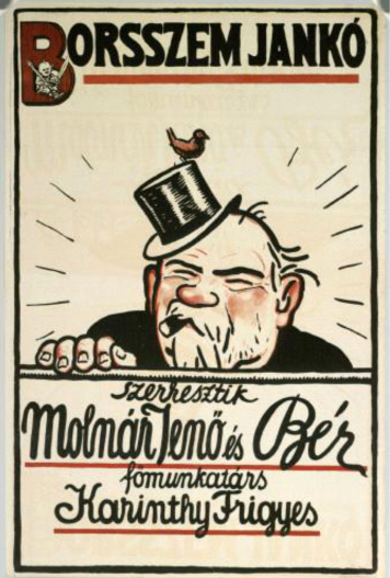 Borsszem Jankó (poster)